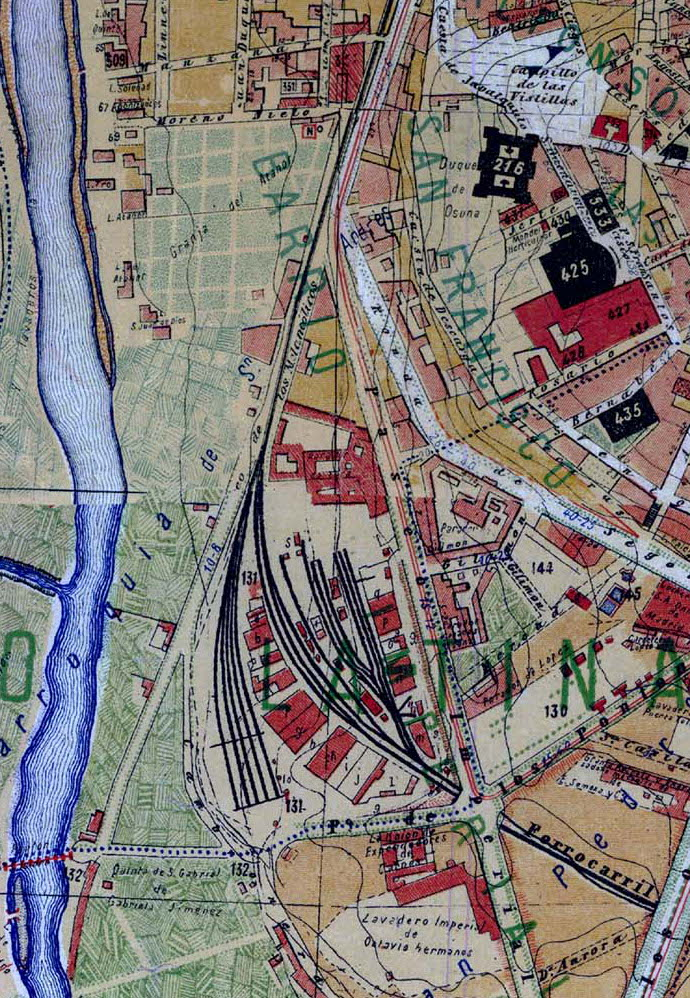 Estación del Paseo Imperial en el plano de Facundo Cañadas López (1902)